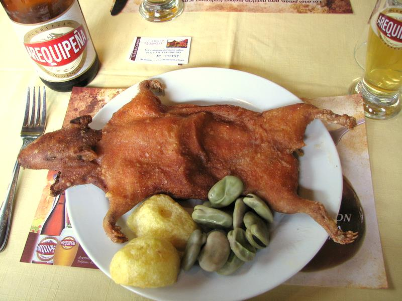 Un cuy chactado (o cuy chactado) en Tradiciones Arequipeñas, un restaurante en Arequipa (también, una botella de la cerveza peruana Arequipeña).